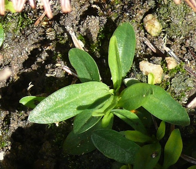 Einjährige Blattrosette eines Böhmischen Enzians (Gentianella praecox bohemica) im österreichischen Mühlviertel/Böhmerwald.